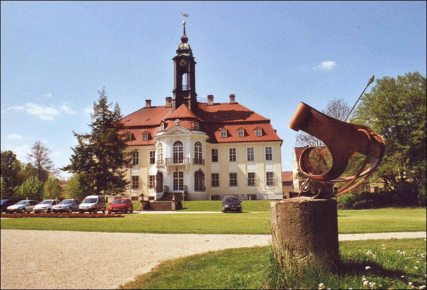 Reinhardtsgrimma: ländliches Barockschloss (1765-67), heute staatliche Fortbildungsstätte für Bedienstete der Agrarverwaltung des Freistaates Sachsen